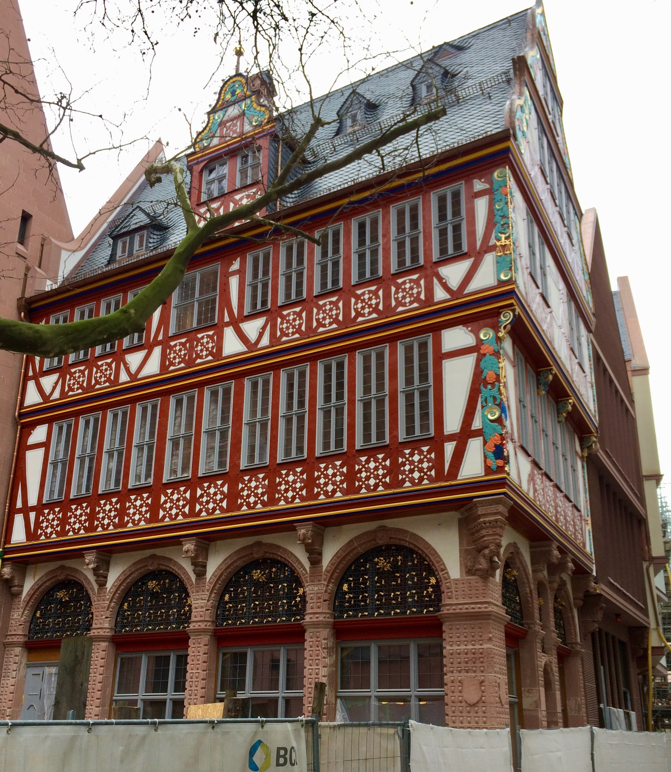 Das rekonstruierte Haus zur Goldenen Waage in Frankfurt kurz vor Abschluss der Bauarbeiten, Ansicht vom Domplatz ohne Baustellenzaun im Januar 2018.